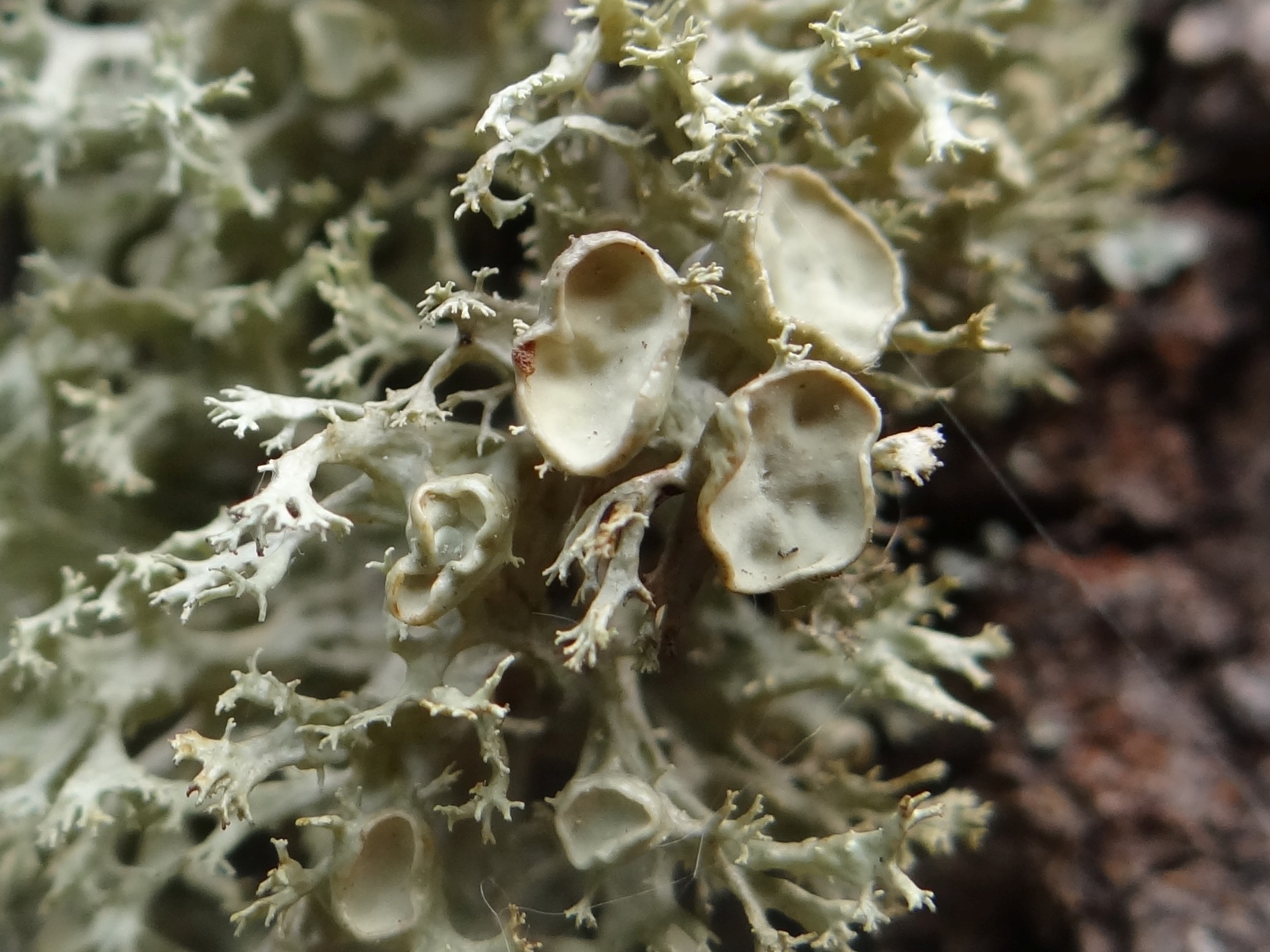 Ramalina fastigiata (location:Slovakia, Vyšné Ružbachy, park)